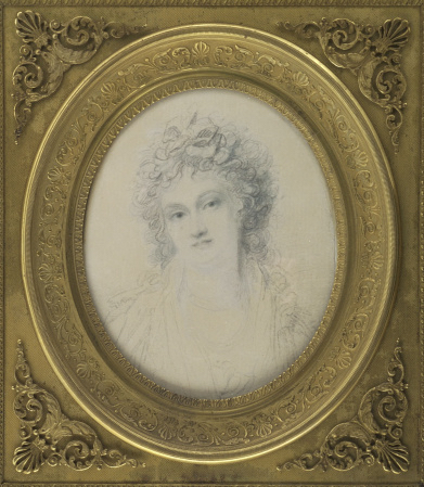 Richard Cosway: Portrait à la mine de plomb de Madame de Montgeroult. Paris, Musée du Louvre, département des arts graphiques (n° d'inventaire RF 836)